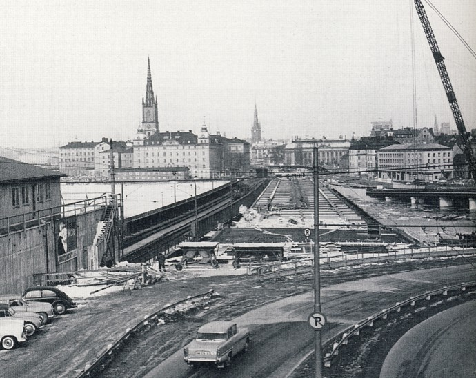 Centralbron i Stockholm under byggnad 1958